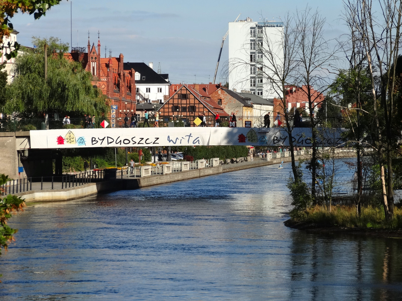 Most Staromiejski im. Jerzego Sulimy-Kamińskiego nad Brdą w Bydgoszczy